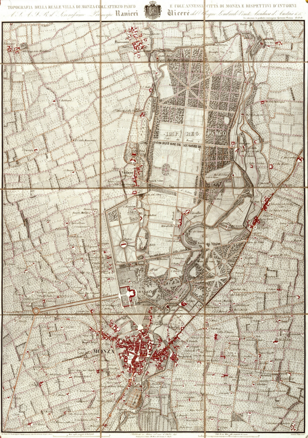 Mappa di Giovanni Brenna sotto Ranieri Viceré.